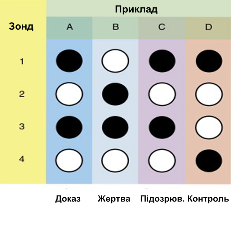 гібридизація